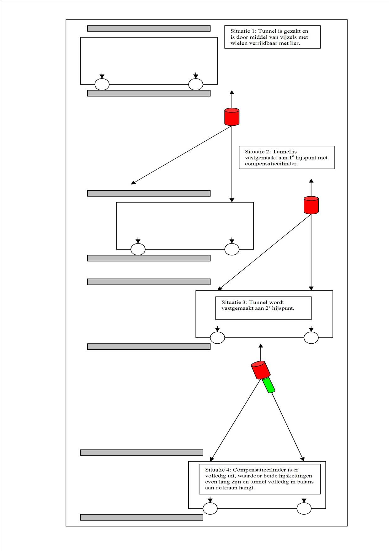 Werking compensatiecilinder, schematisch.